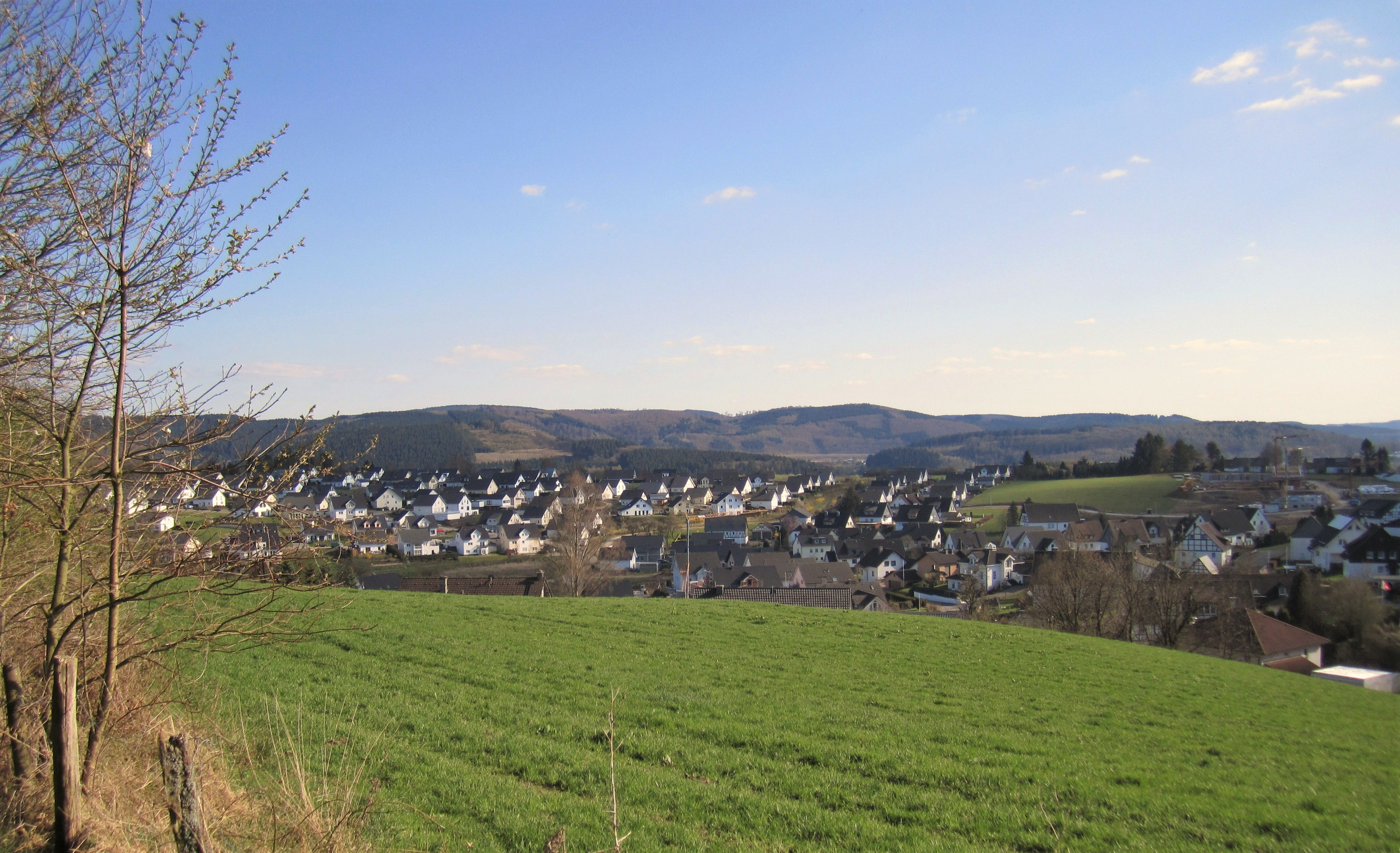 Blick vom Noacken auf den Attendorner Ortsteil Biekhofen. Rechts alte Bauernhäuser und die ehemalige Gaststätte Luke im Ortskern. Links das Neubaugebiet Wippeskuhlen.